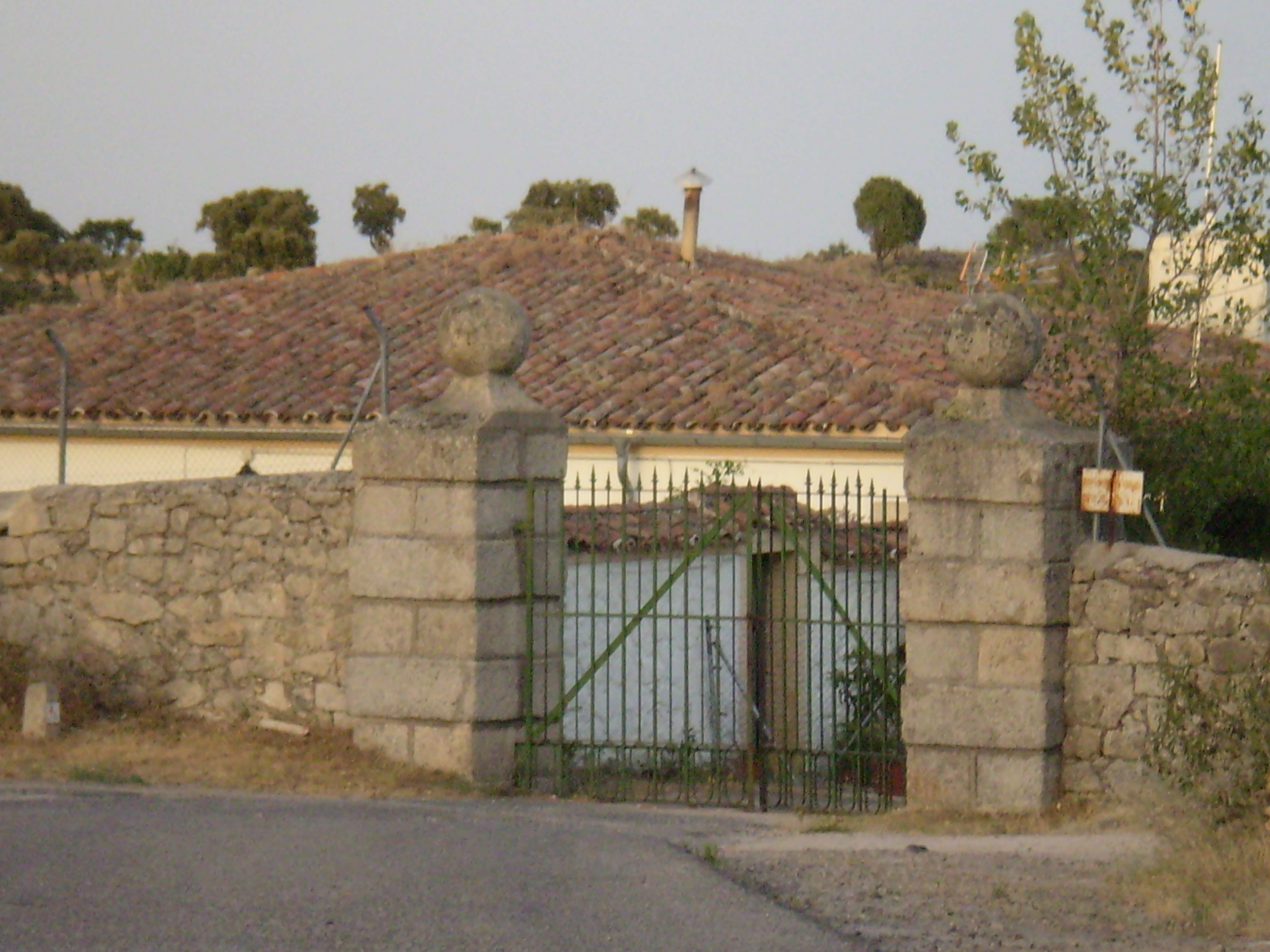 Wall of Monte de El Pardo. Border El Pardo-Torrelodones, Madrid, Spain